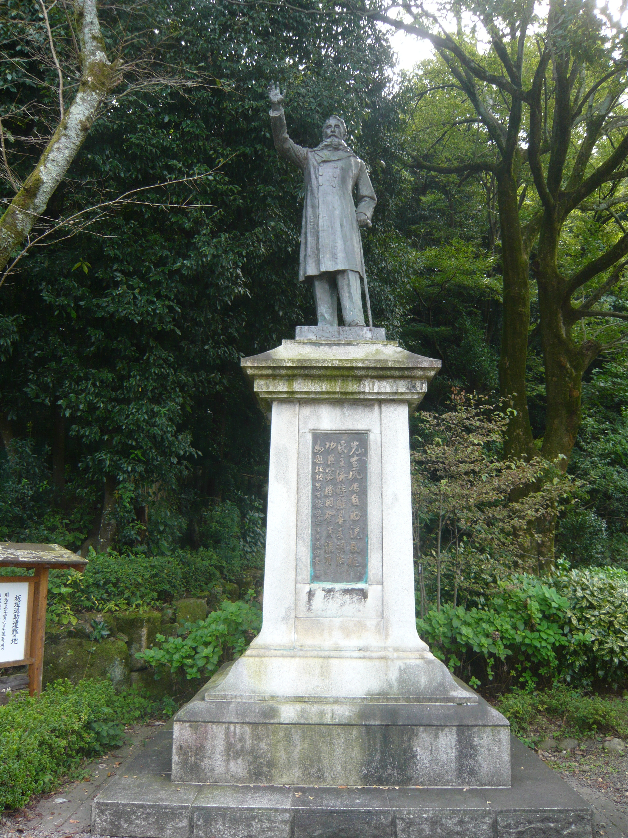 Gifu Park 板垣退助の銅像（岐阜公園）,Gifu,Gifu,Japan（岐阜県岐阜市）で撮影。